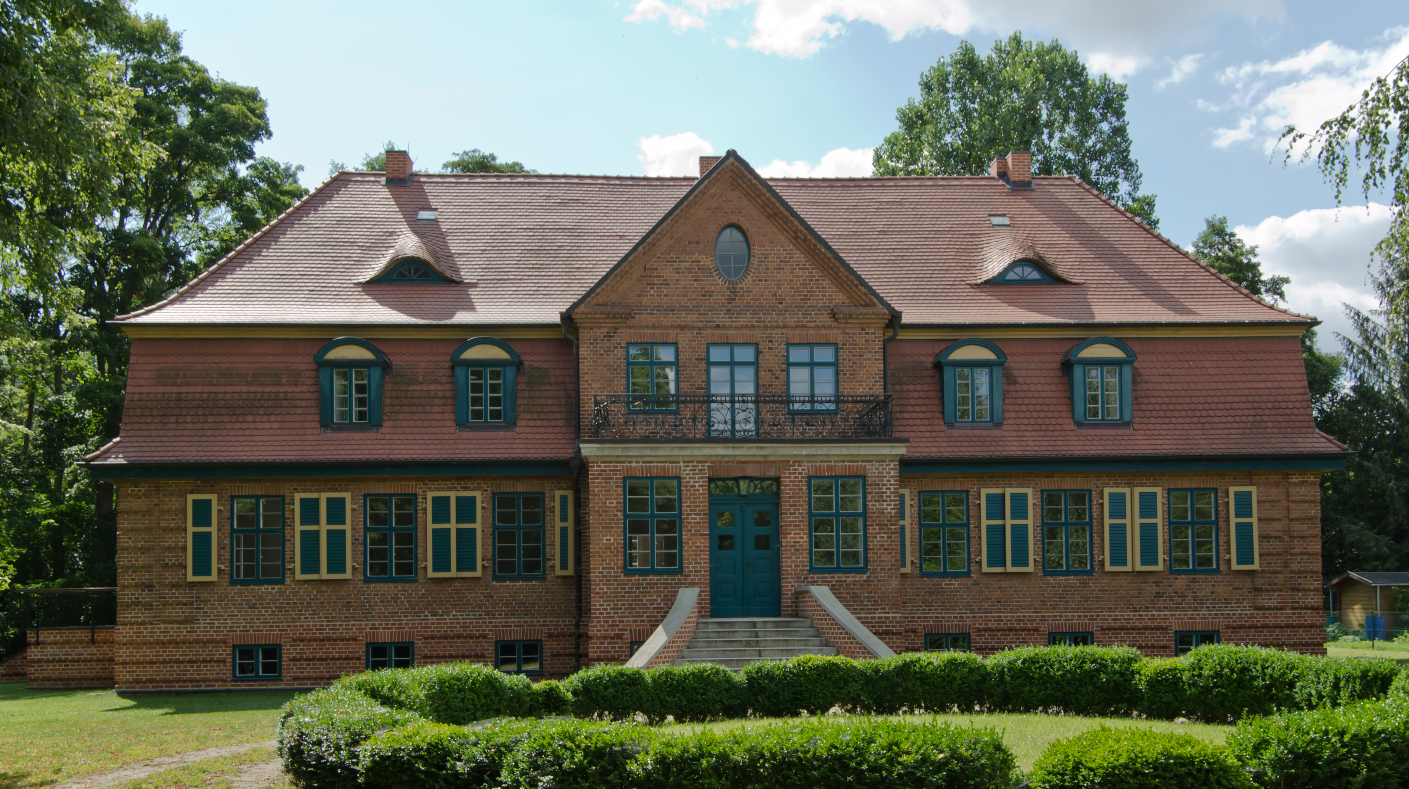 Kambs Gutshaus